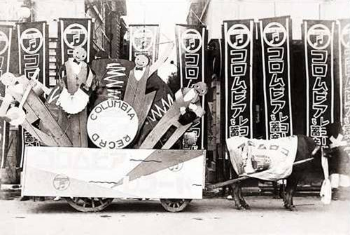 台北防災設施